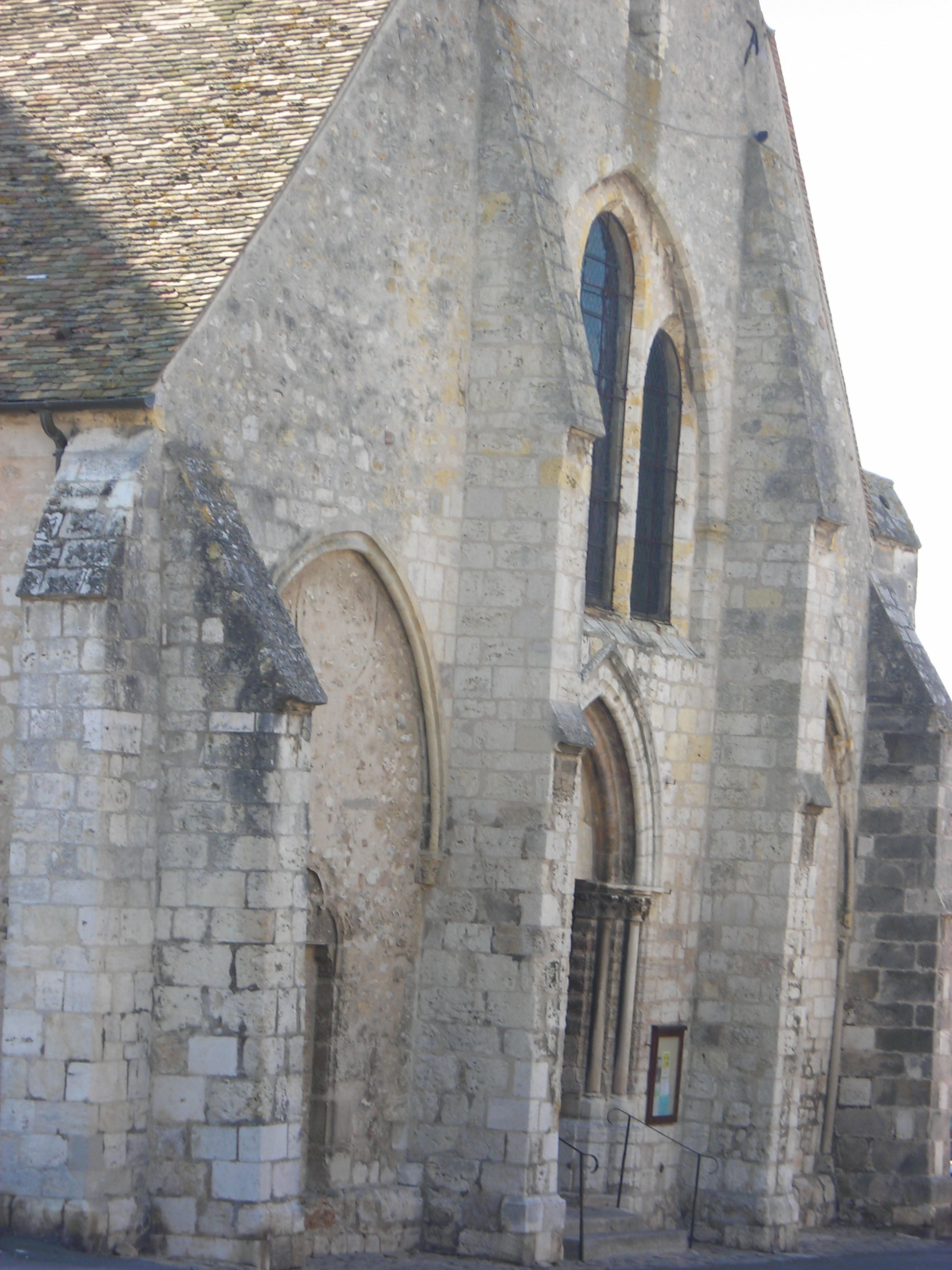 Église Saint-Étienne d'Étréchy, Essonne, France